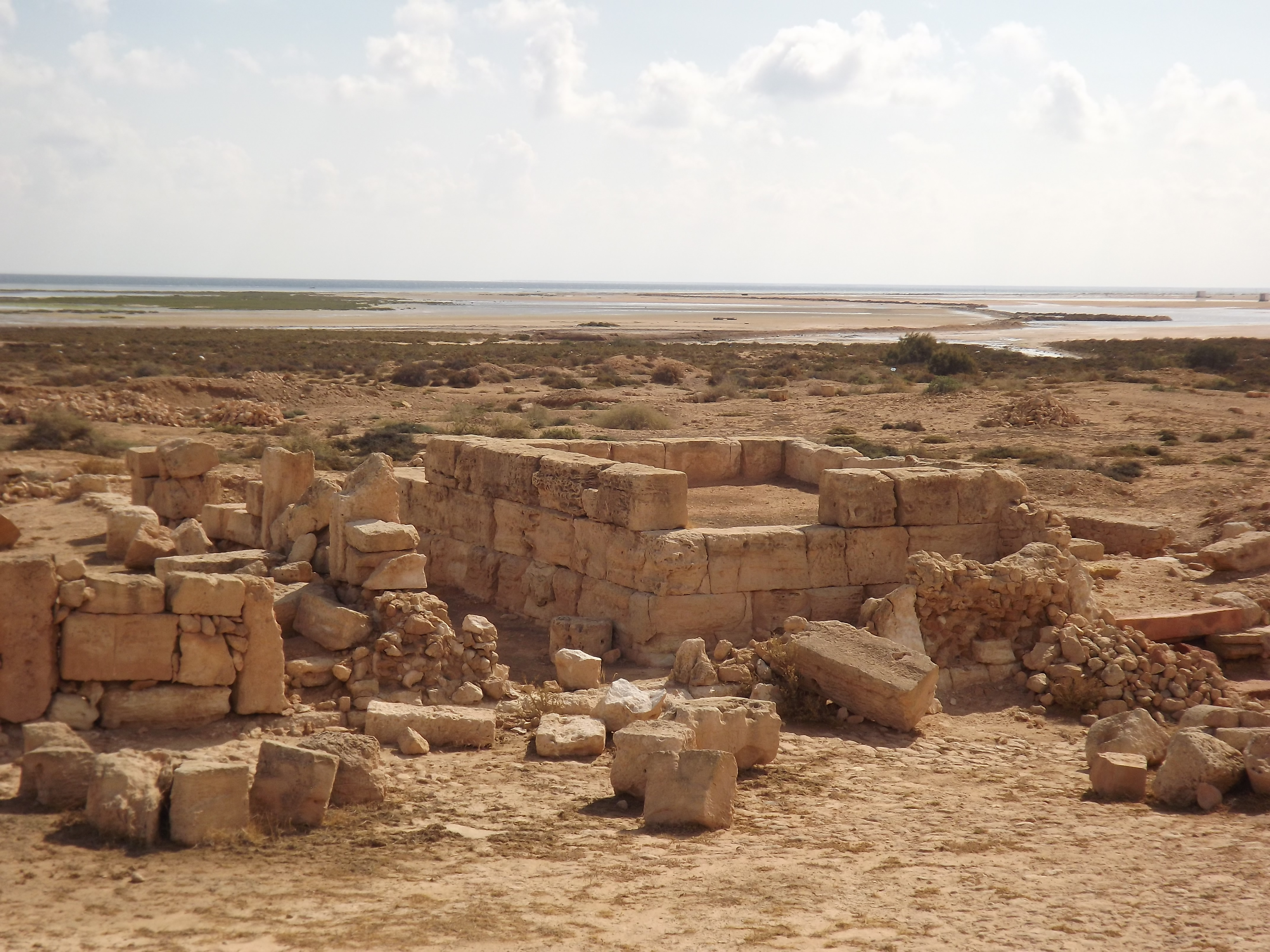 Temple d’Esculape